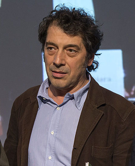 Lo scrittore italiano Sandro Veronesi alla finale del Premio Chiara 2012.